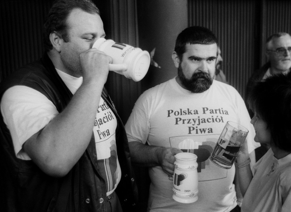 Polska Partia Przyjaciół Piwa, Warsaw (1991)